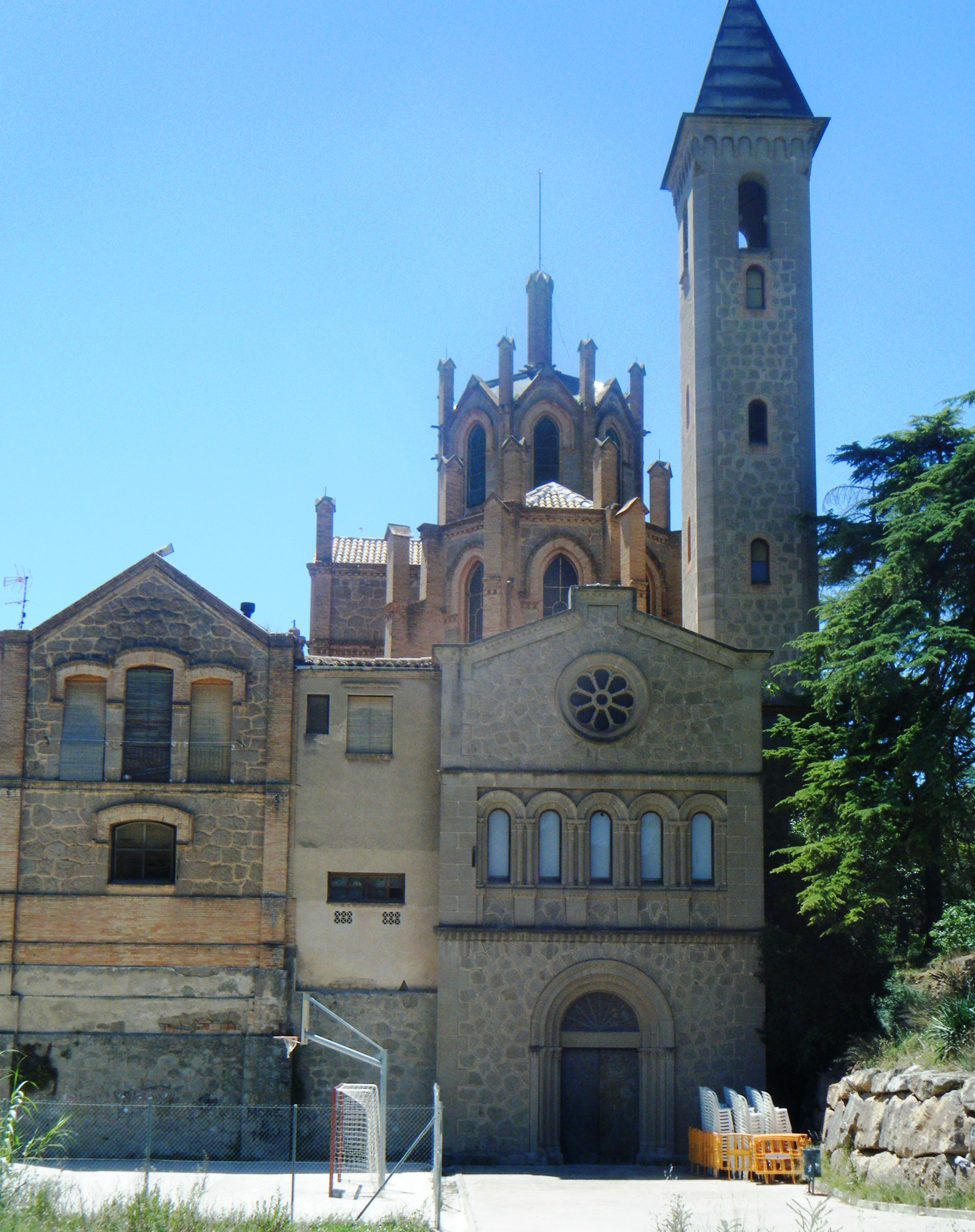 Entrada a la cripta de l'església, on hi ha el panteó de la família Pons.